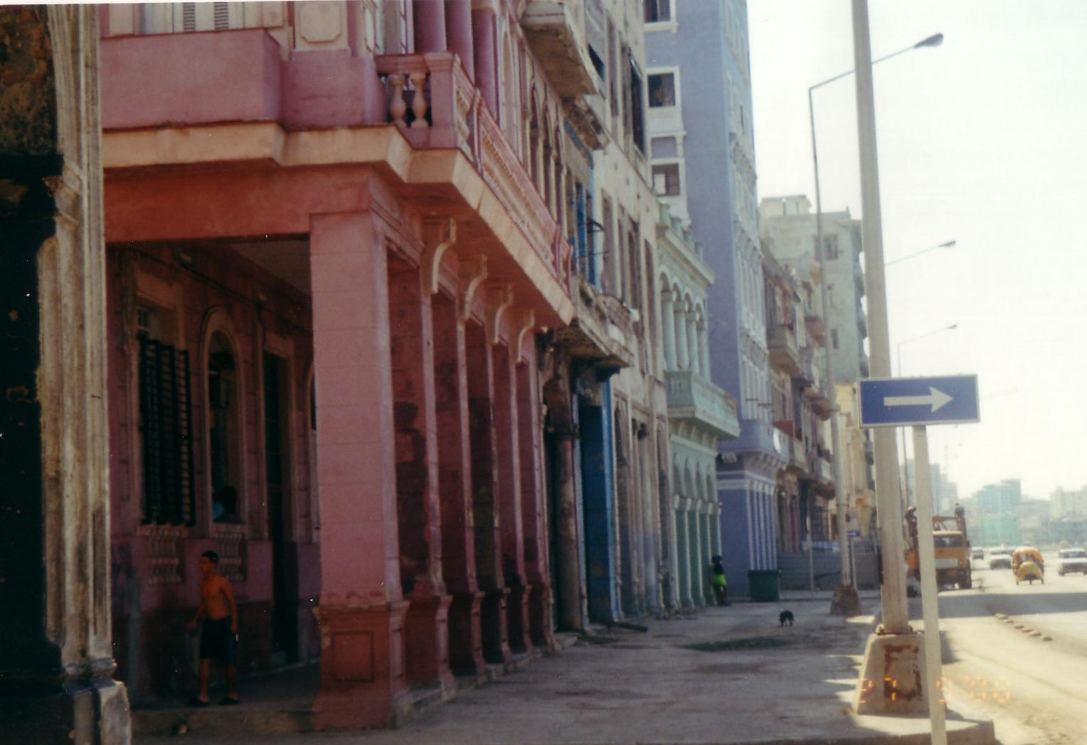 Malecon, Havana